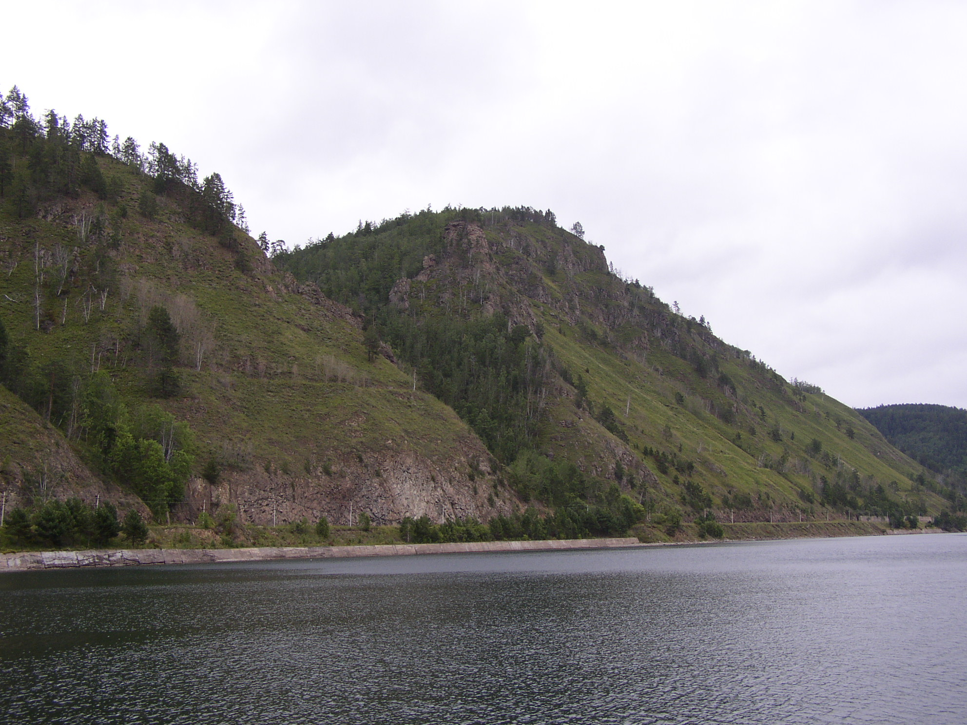 Lake Baikal - West shore